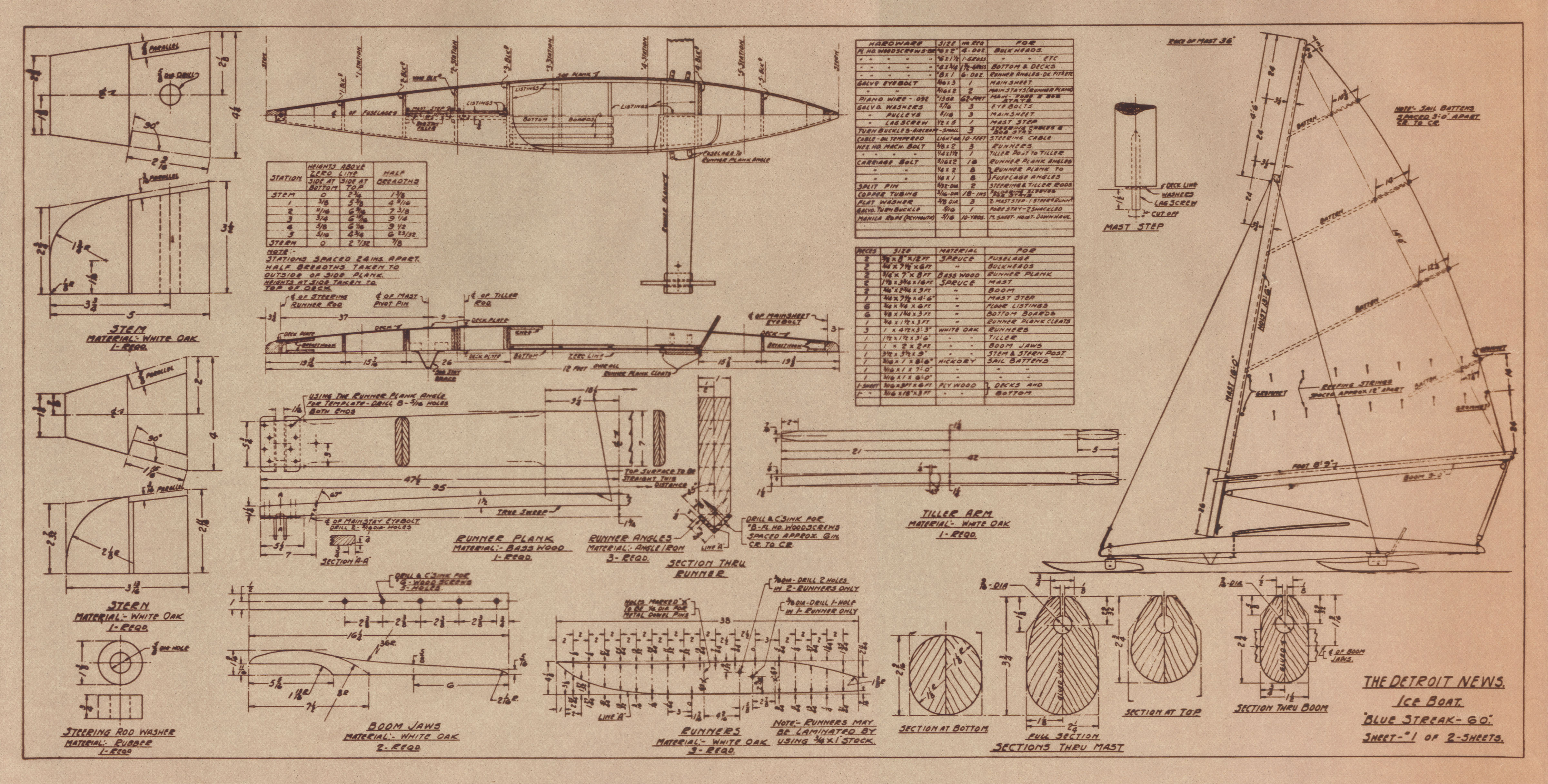 The original blueprints for the Blue Streak 60